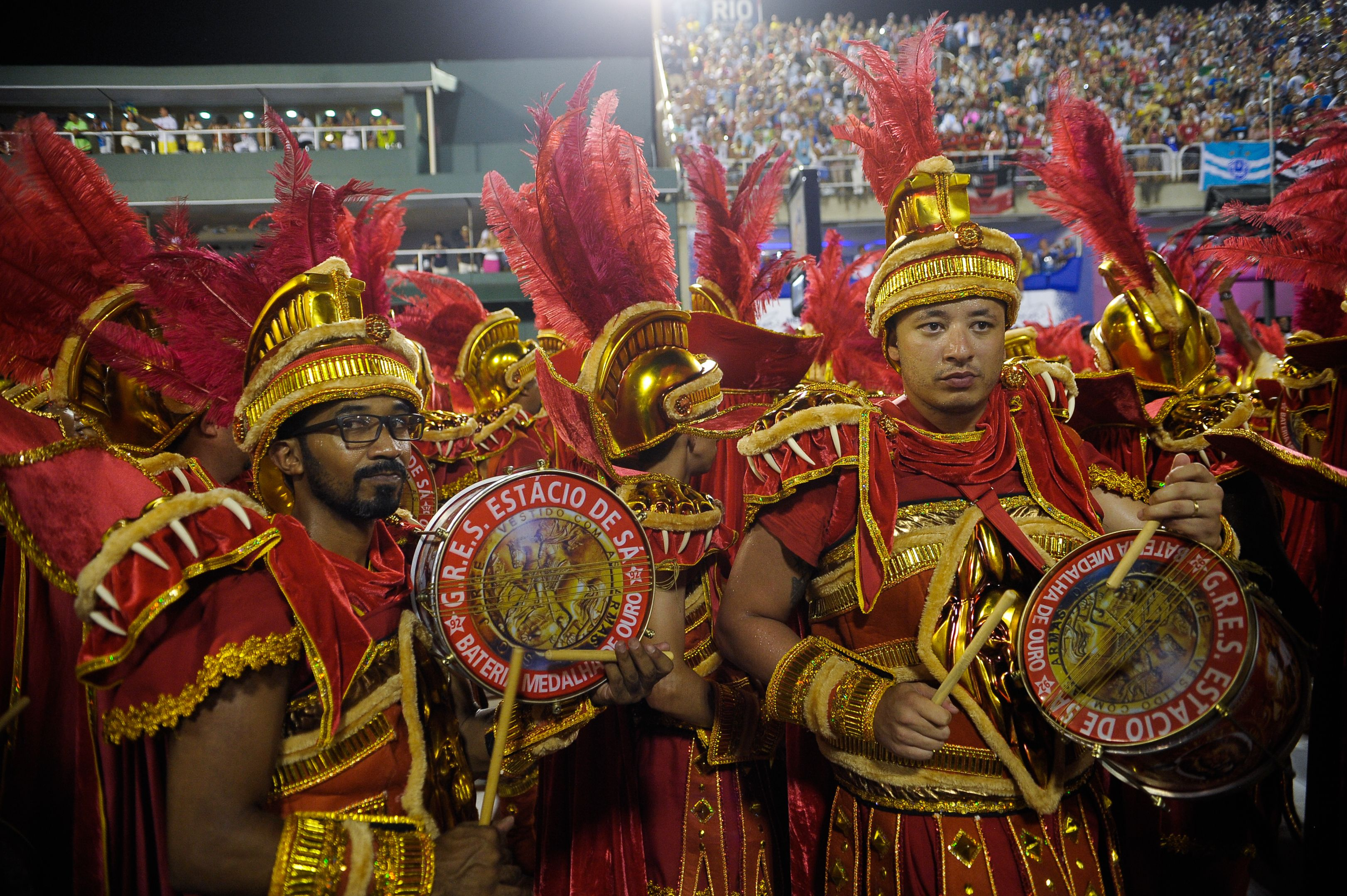 Rio de Janeiro - Escola Estácio de Sá é a primeira escola a entrar na Sapucaí,leva à avenida enredo sobre São Jorge (Tomaz Silva/Agência Brasil)